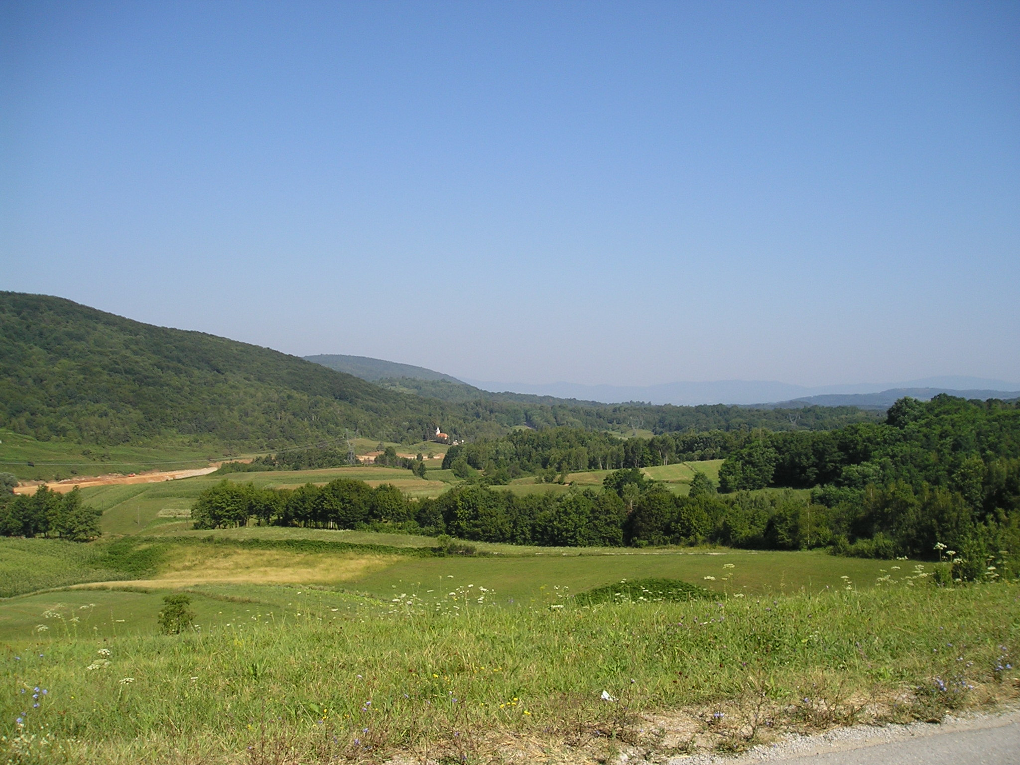 Ribnička dolina